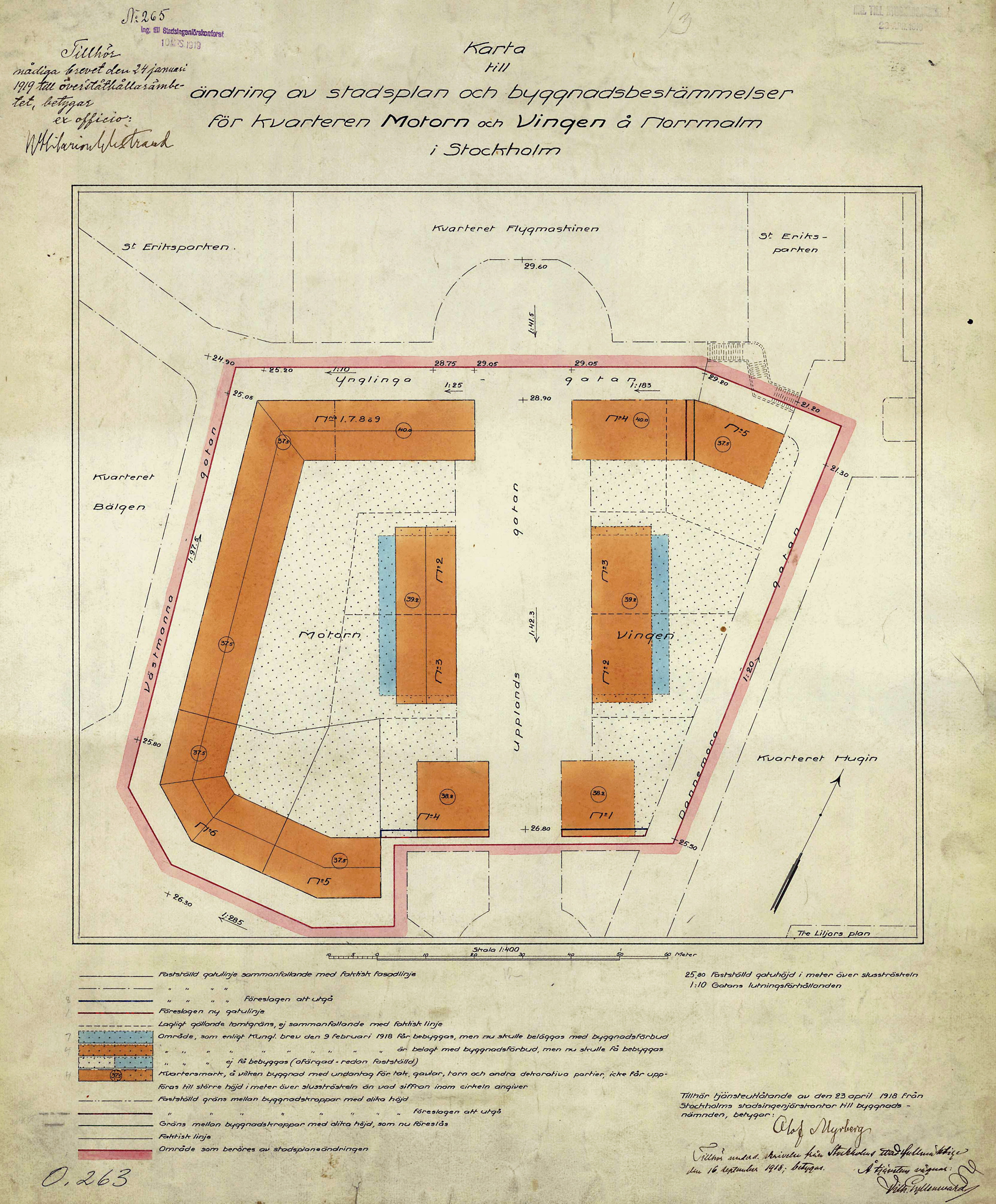 Reviderad Stadsplan för Motorn och Vingen